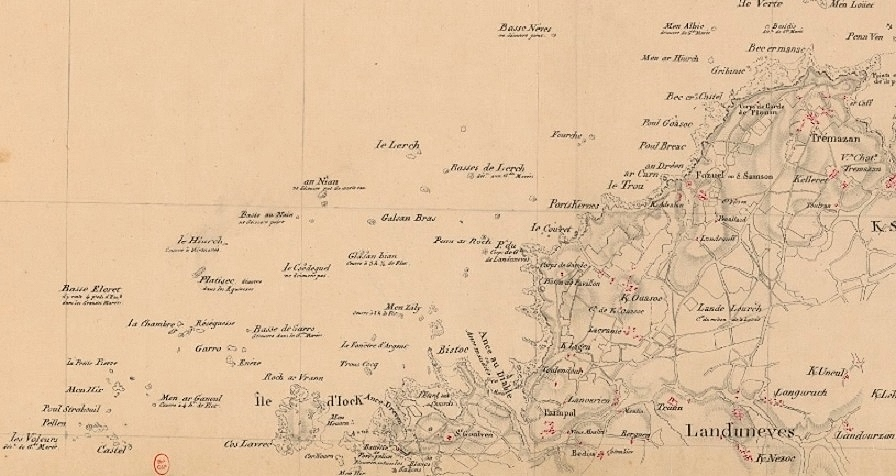 Carte de Landunvez à la fin du XVIIIe siècle (Bibliothèque nationale de France, département Cartes et plans).